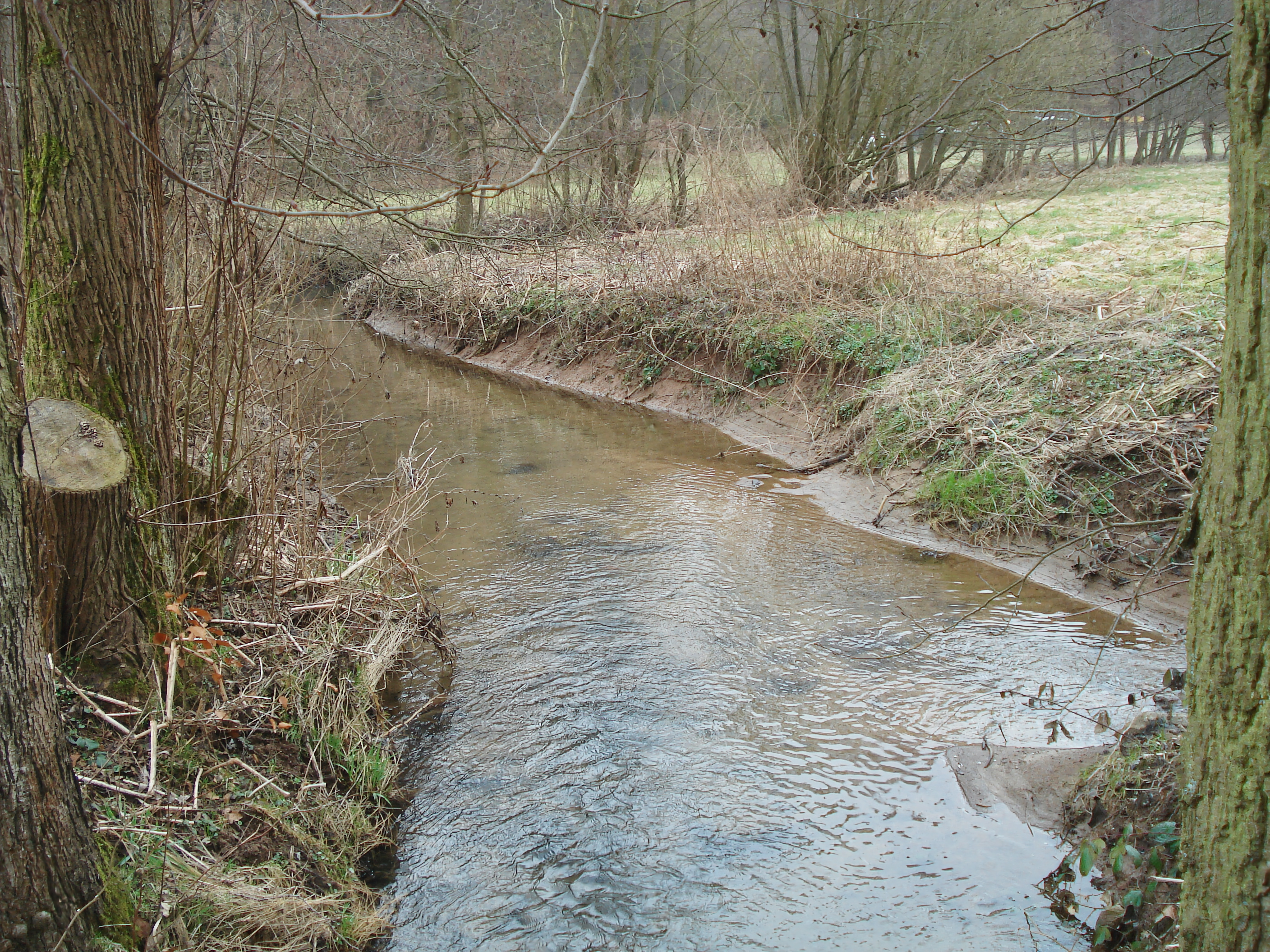 Die Mündung des Waizenbaches (rechts) in den Schneppenbach